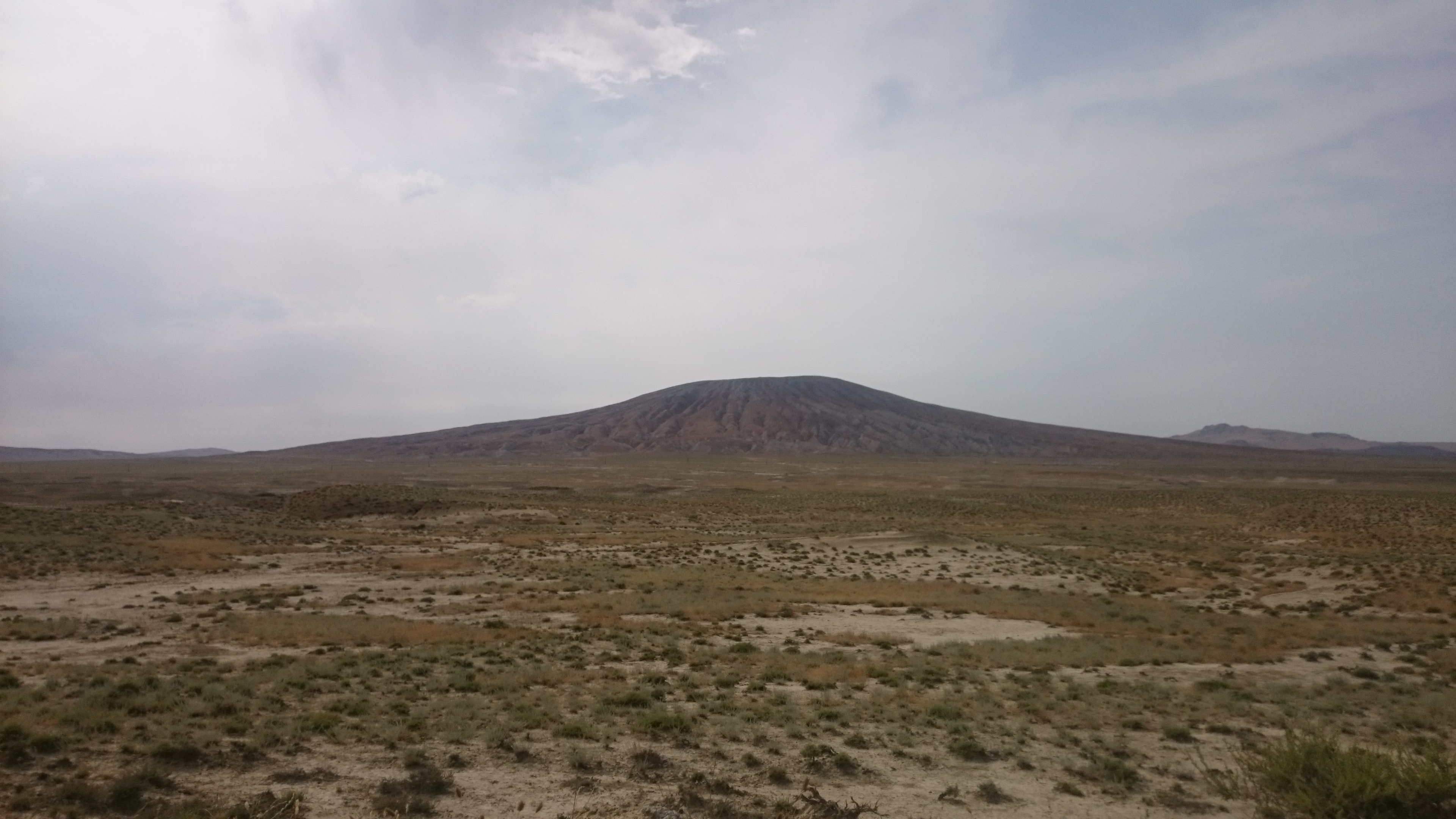 Qobustan vulkan palçıq 3